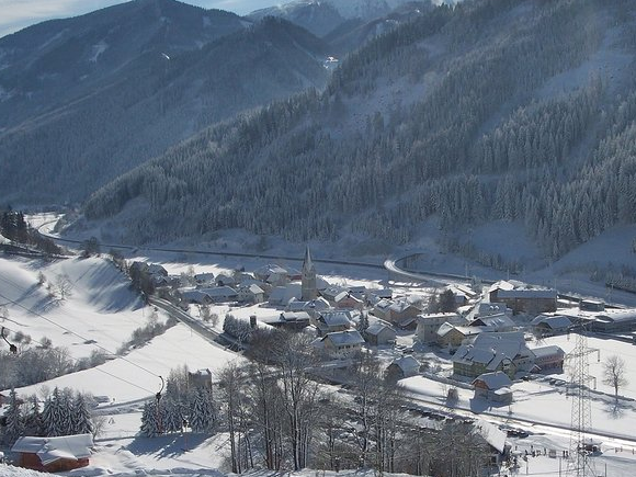 Wald am Schoberpass im Bezirk Leoben